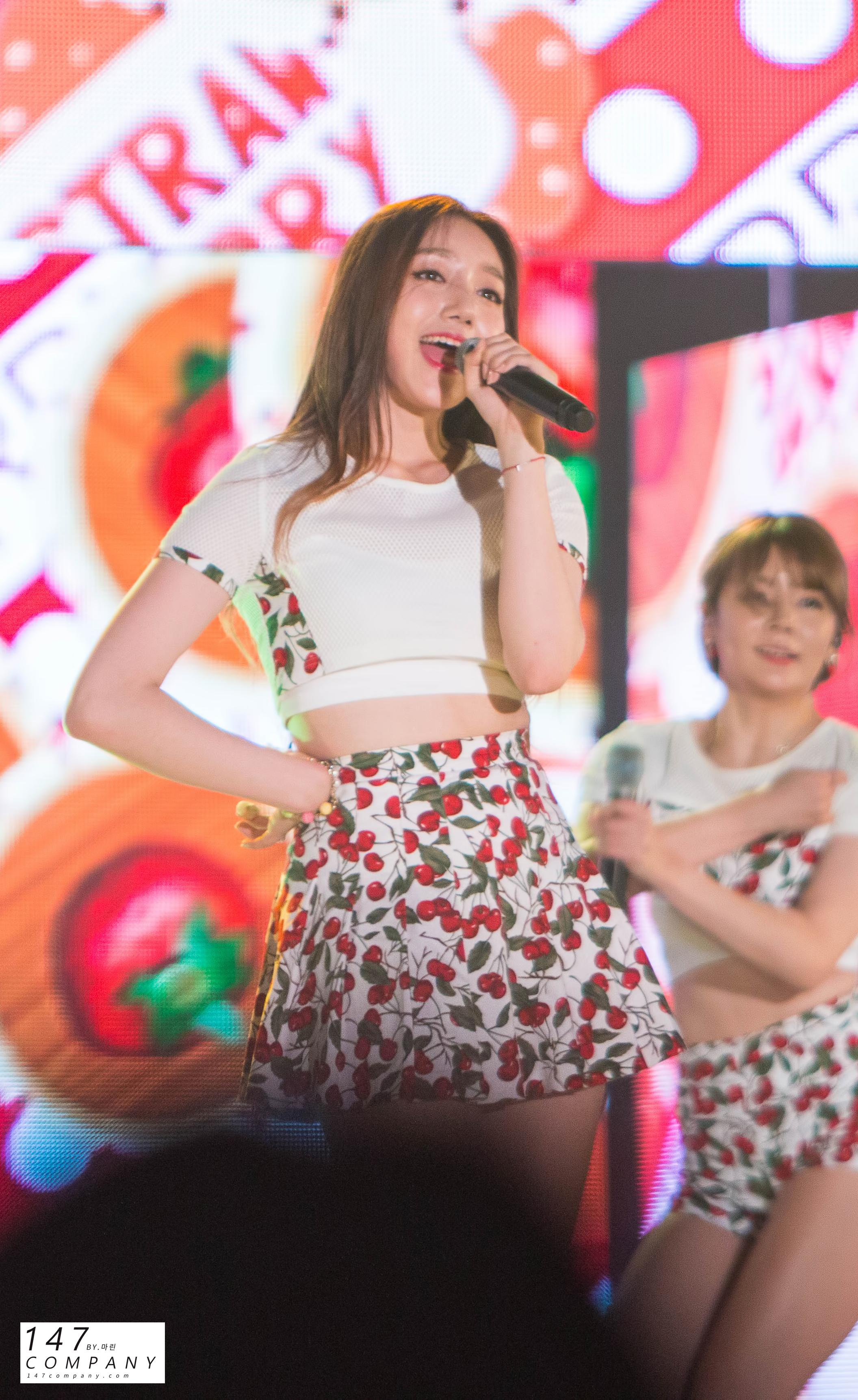 161002 루키아시아 in대구